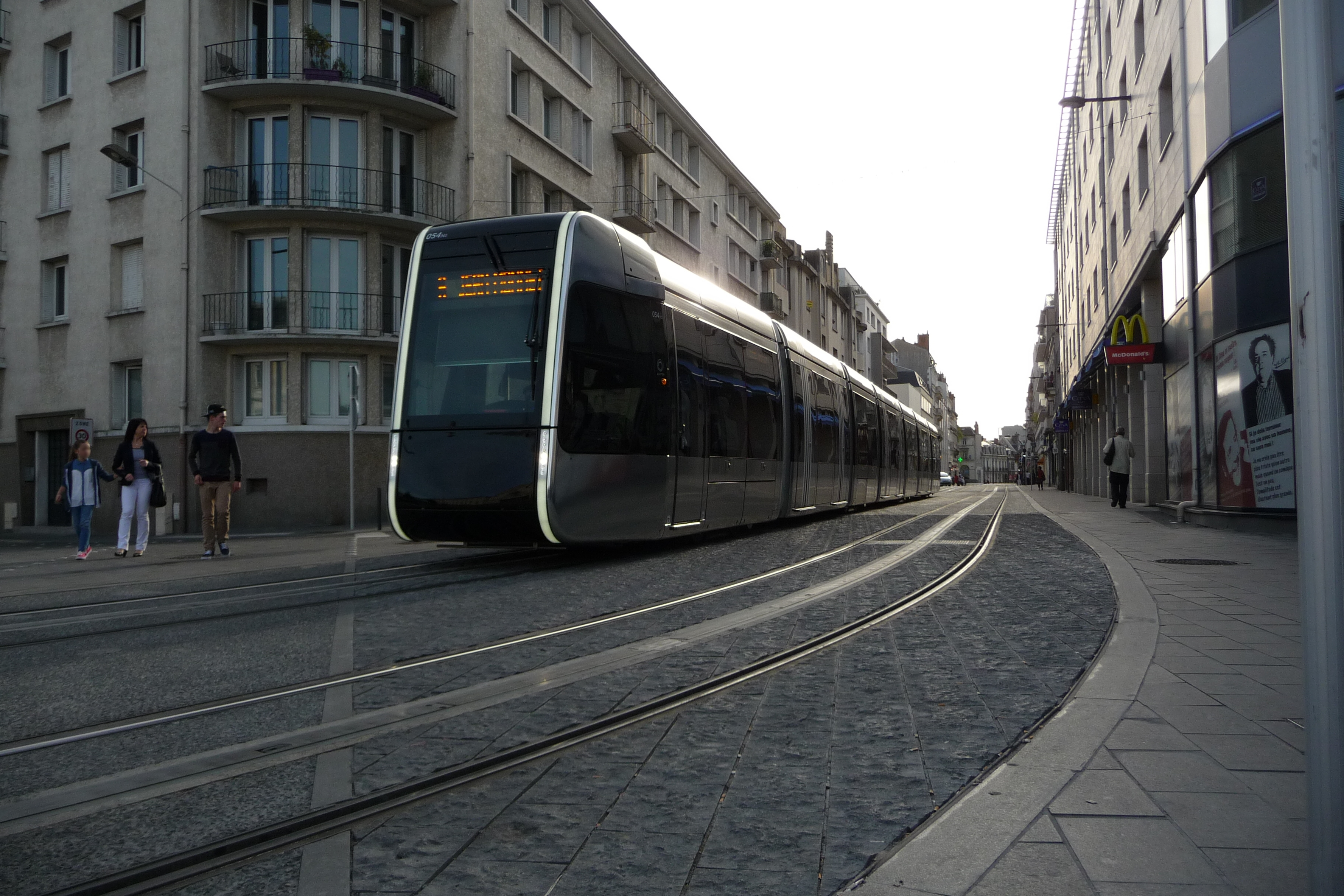 Rame du tramway de Tours, rue Charles-Gilles.